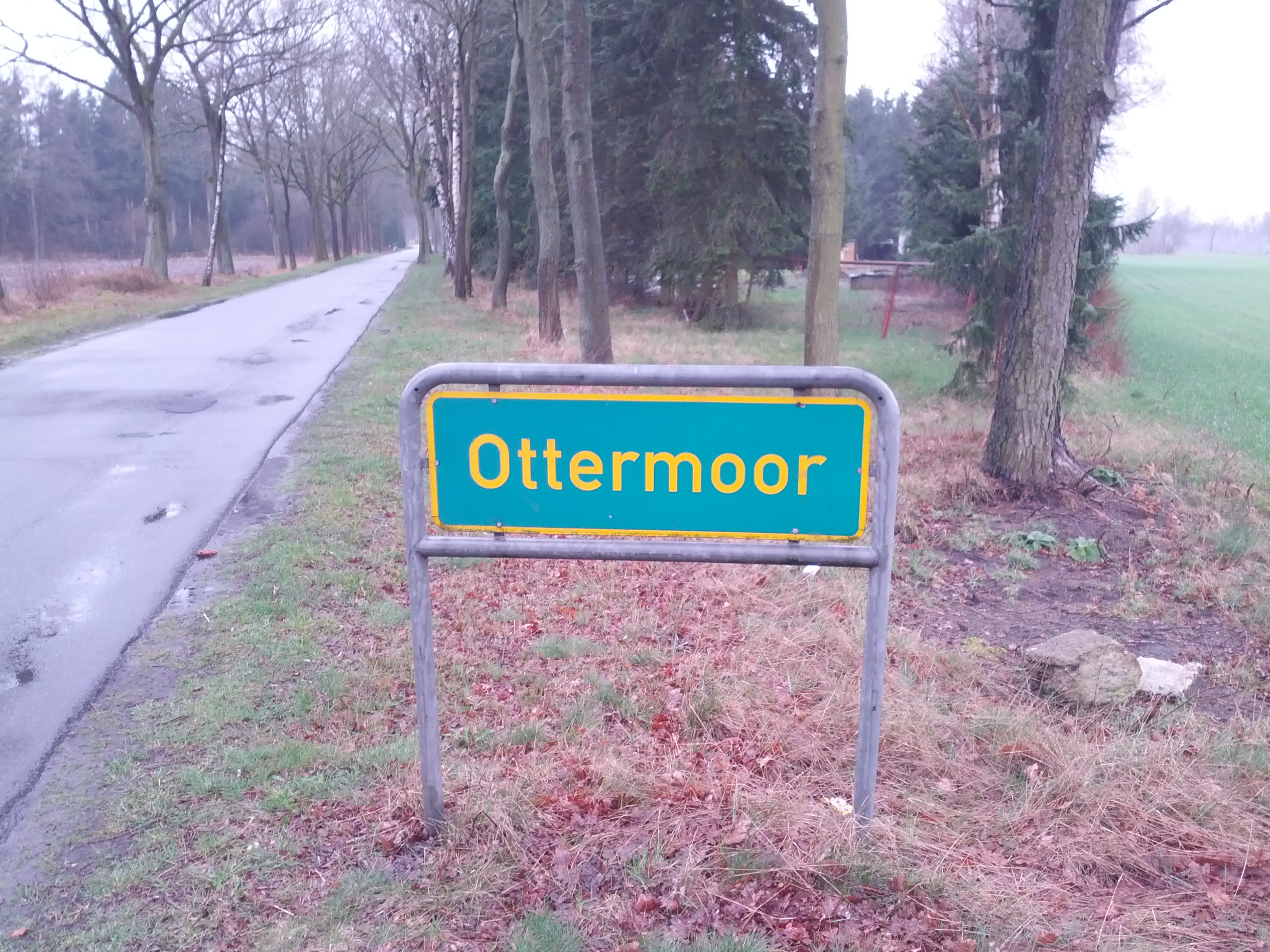 Oortsschild von Ottermoor